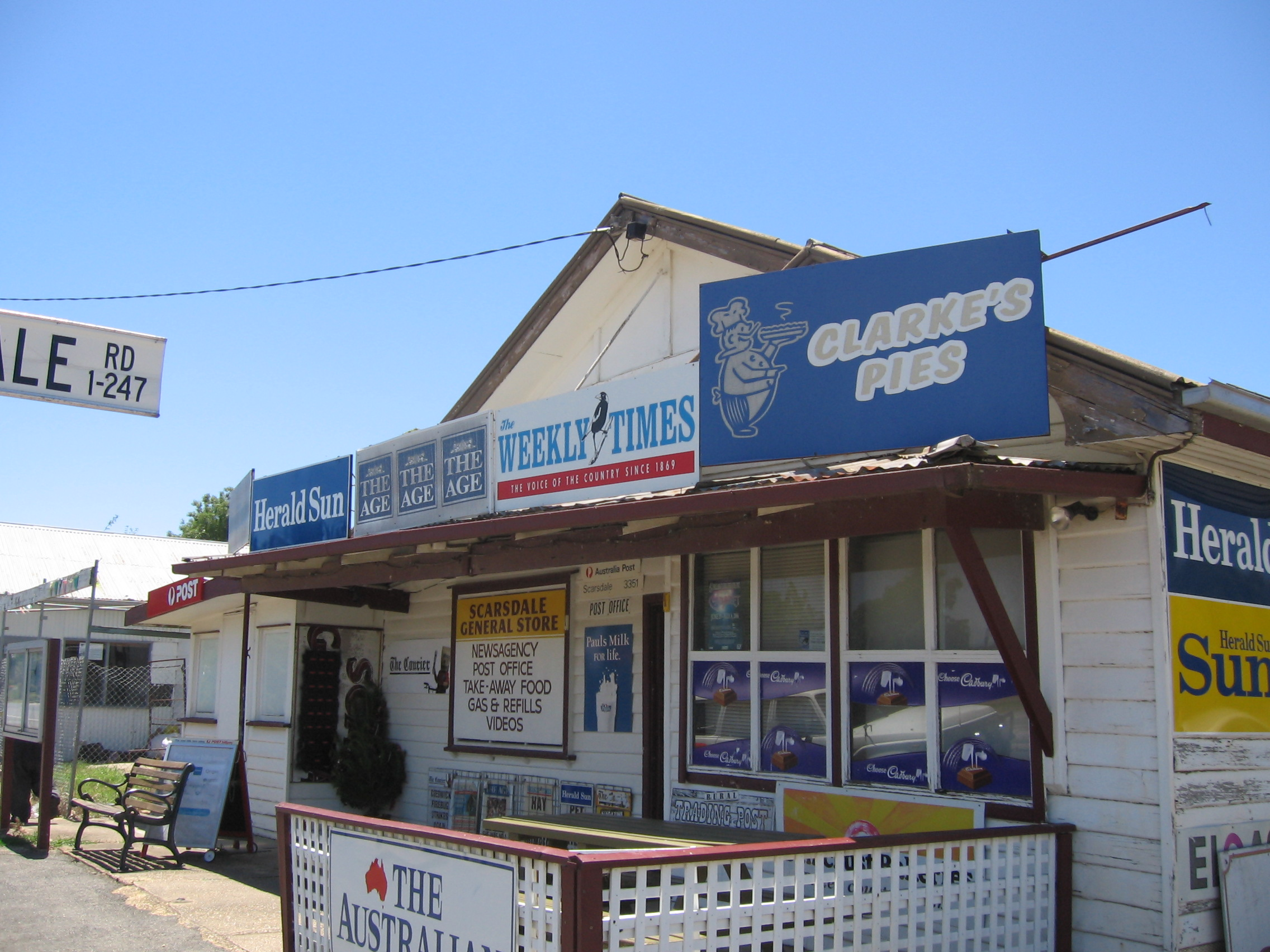 General store at Scarsdale, Victoria